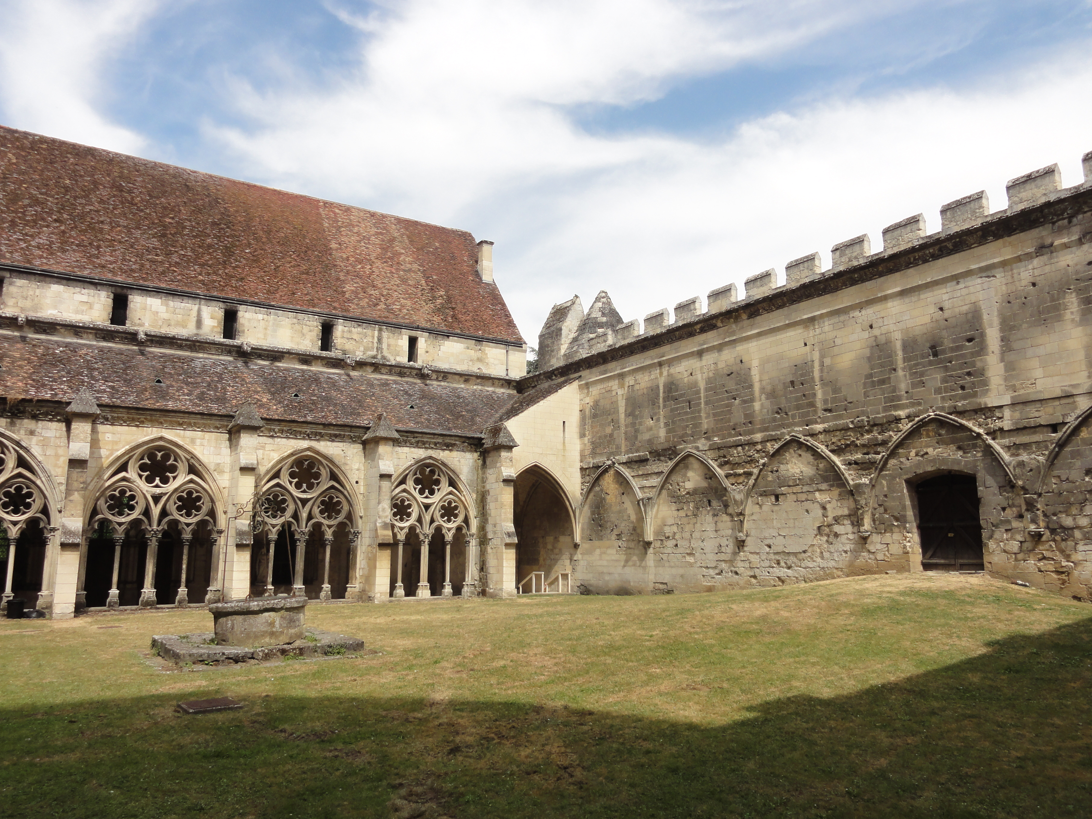 Cloître du chapitre de chanoines de la cathédrale - voir le titre du fichier.